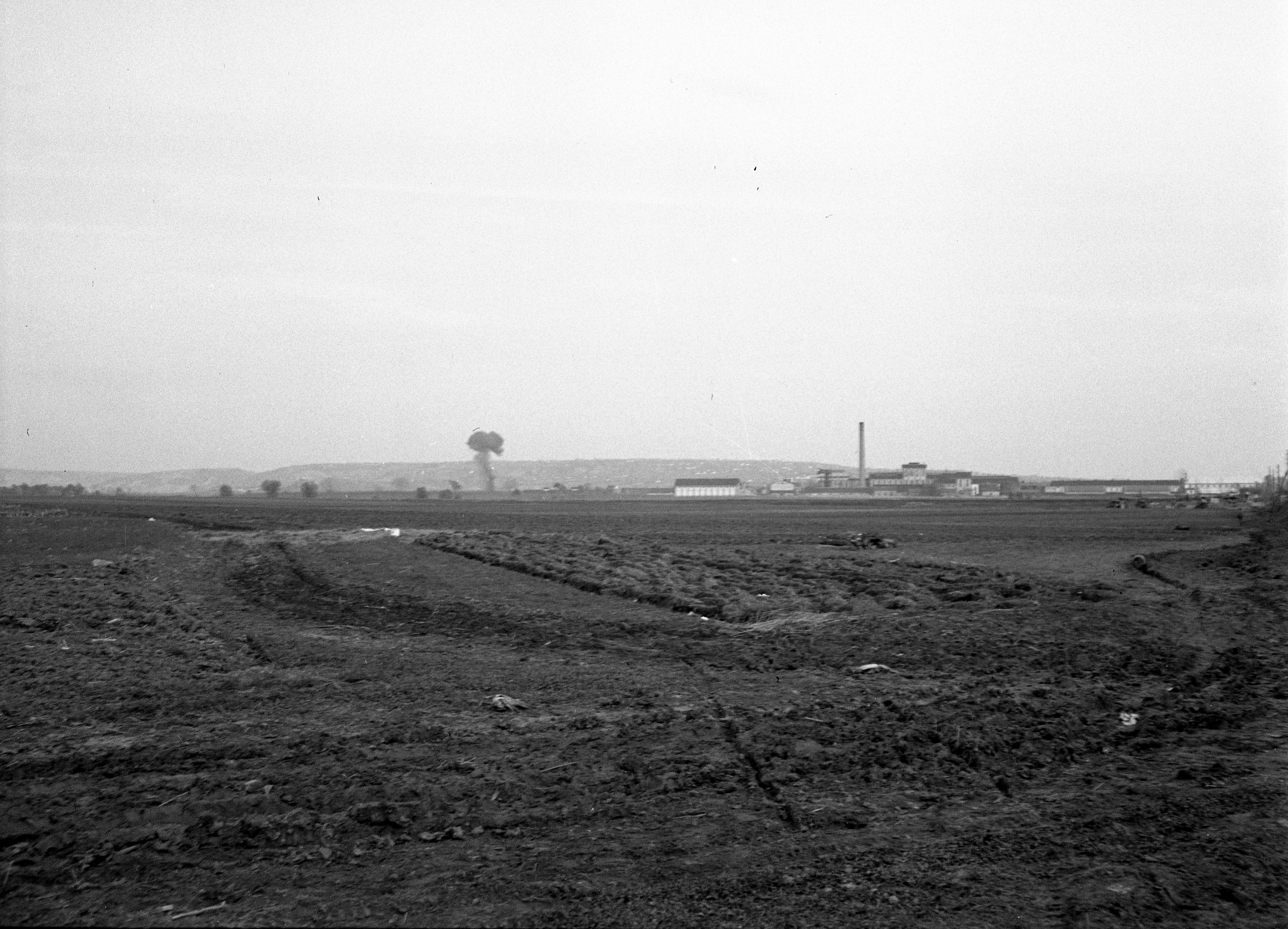 látkép a vasúttól észak felé, háttérben a cukorgyár. Location: Croatia, Beli Manastir Tags: picture, factory, explosion, field, factory chimney, smoke Title: látkép a vasúttól észak felé, háttérben a cukorgyár.